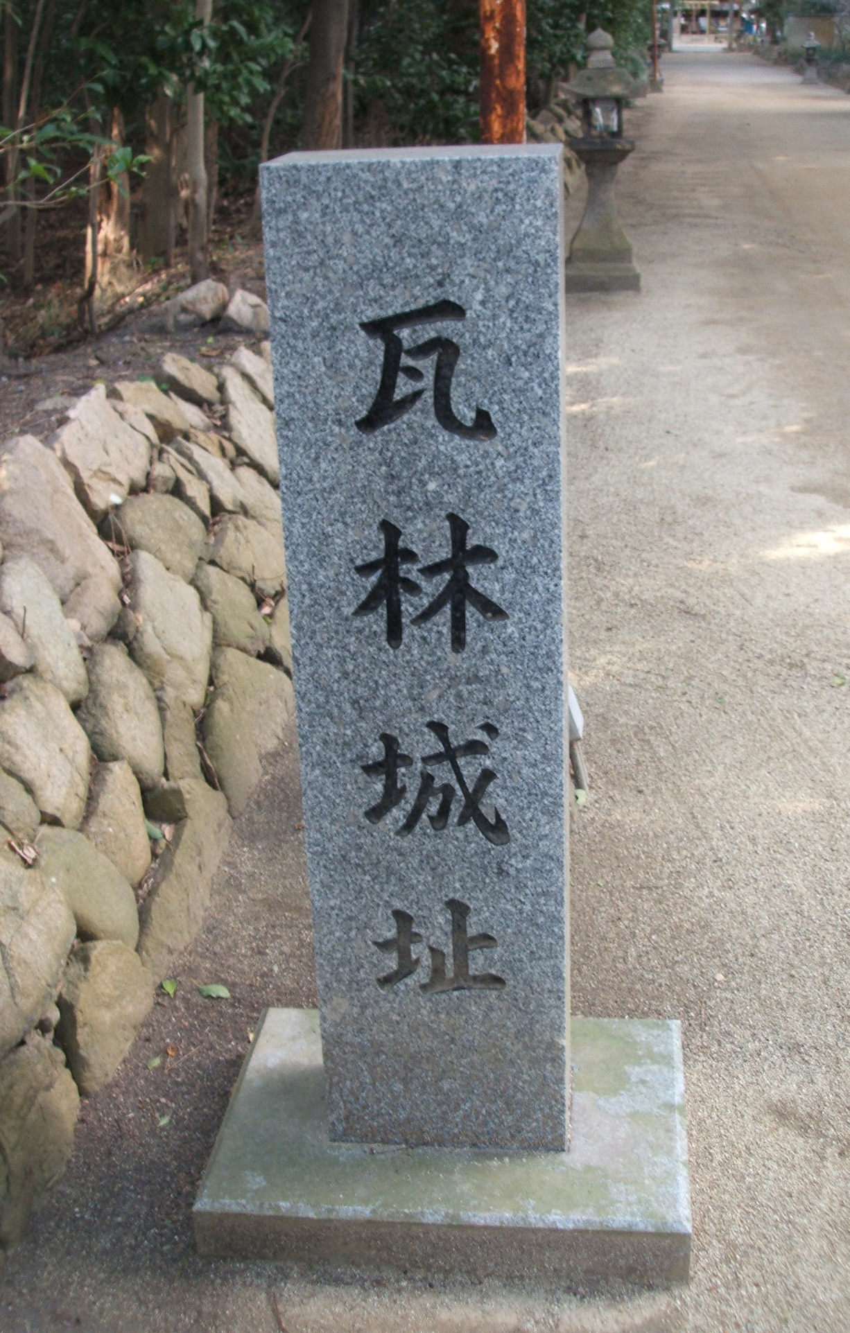 瓦林城石碑